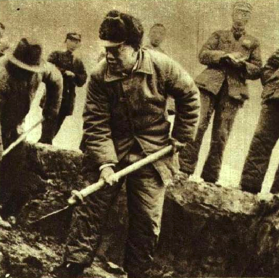 1950年11月治淮委员会副主任曾希圣